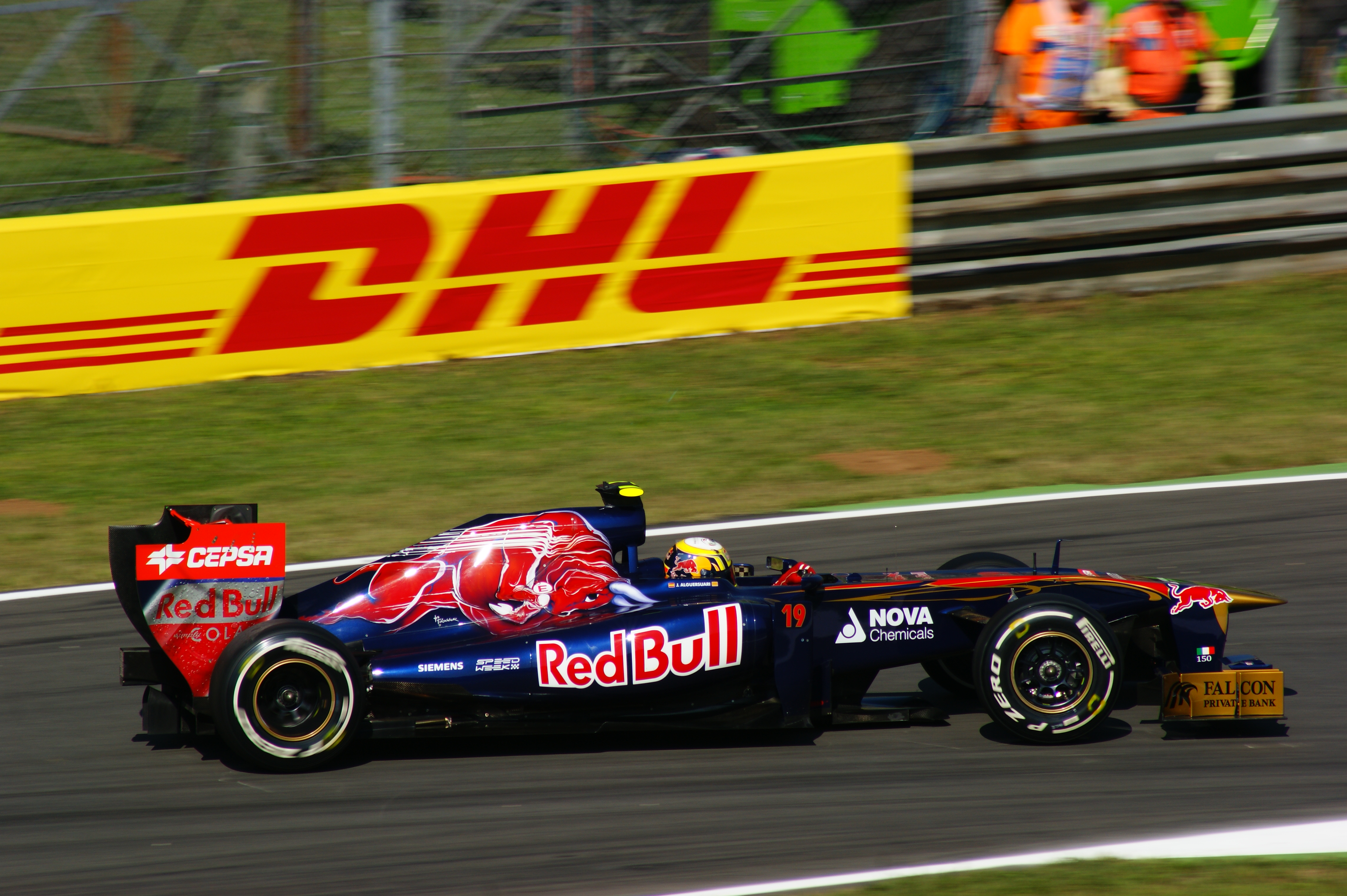 Jaime Alguersuari alla prima variante Monza 2011